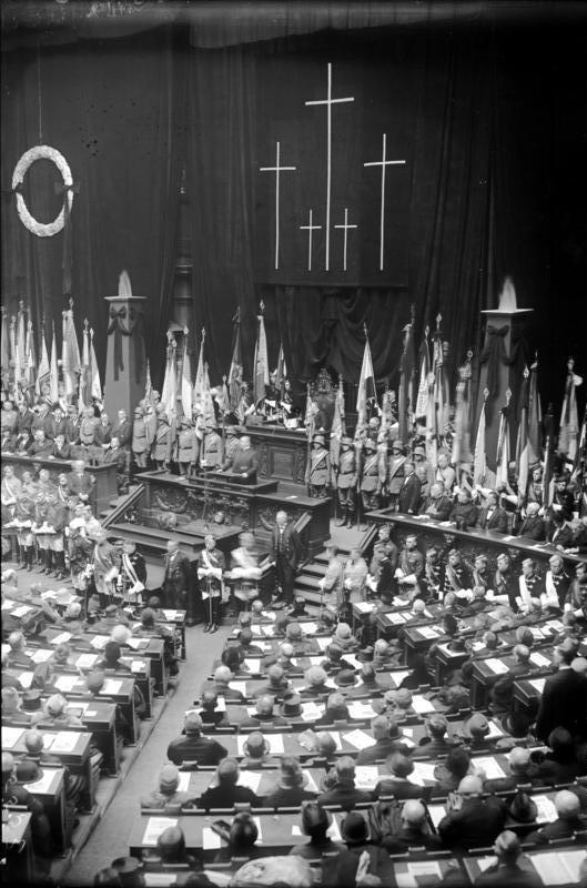 Volkstrauertag für die Gefallenen im Weltkrieg im Plenarsitzungssaal des Reichstages unter Anwesenheit des Reichspräsidenten von Hindenburg sowie der Reichs- und Staatsregierung. Blick in den feierlich geschmückten Plenarsitzungssaal des Reichstages mit den Abordnungen der siegreichen Fahnen alter Regimenter während der Trauerkundgebung.